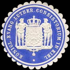 Sealing stamp Title: Königl. Evangelisch lutherisches Consistorium in Kiel Description: blau, weiß, geprägt Place: Kiel size: 4 cm